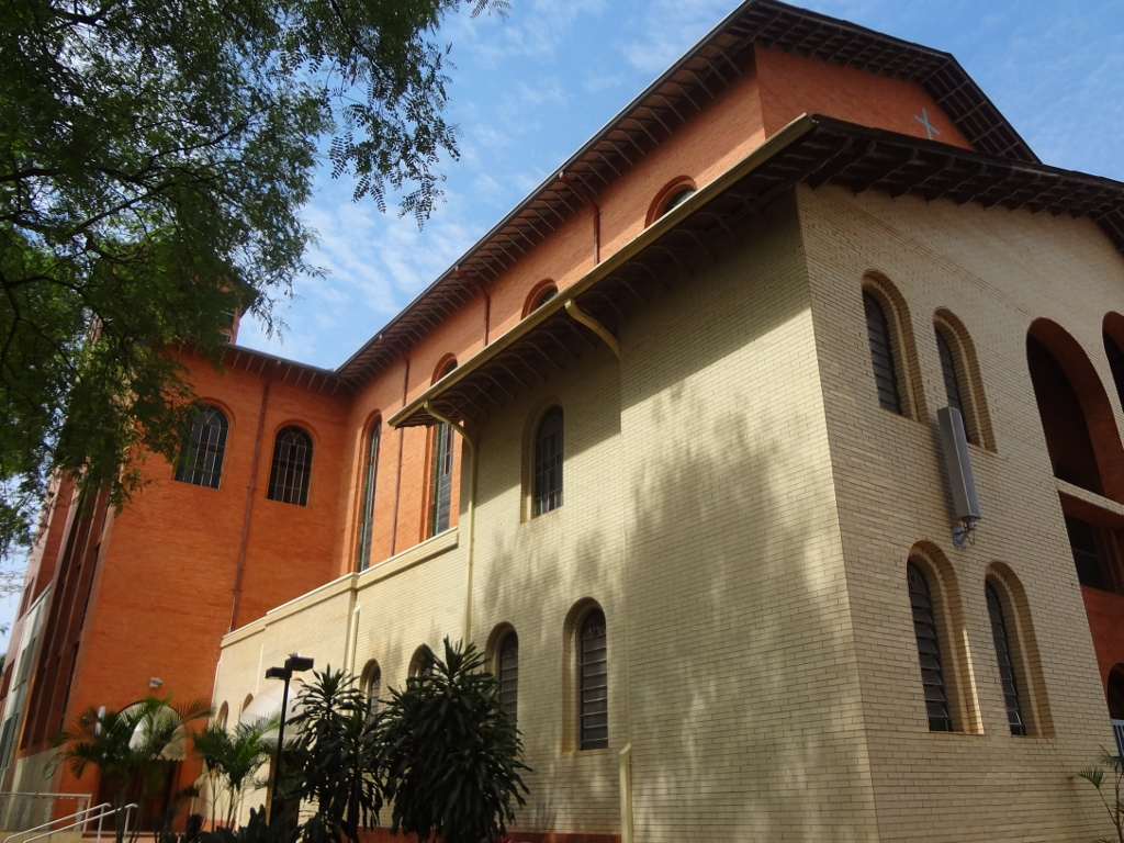 Catedral da cidade de Catanduva, SP